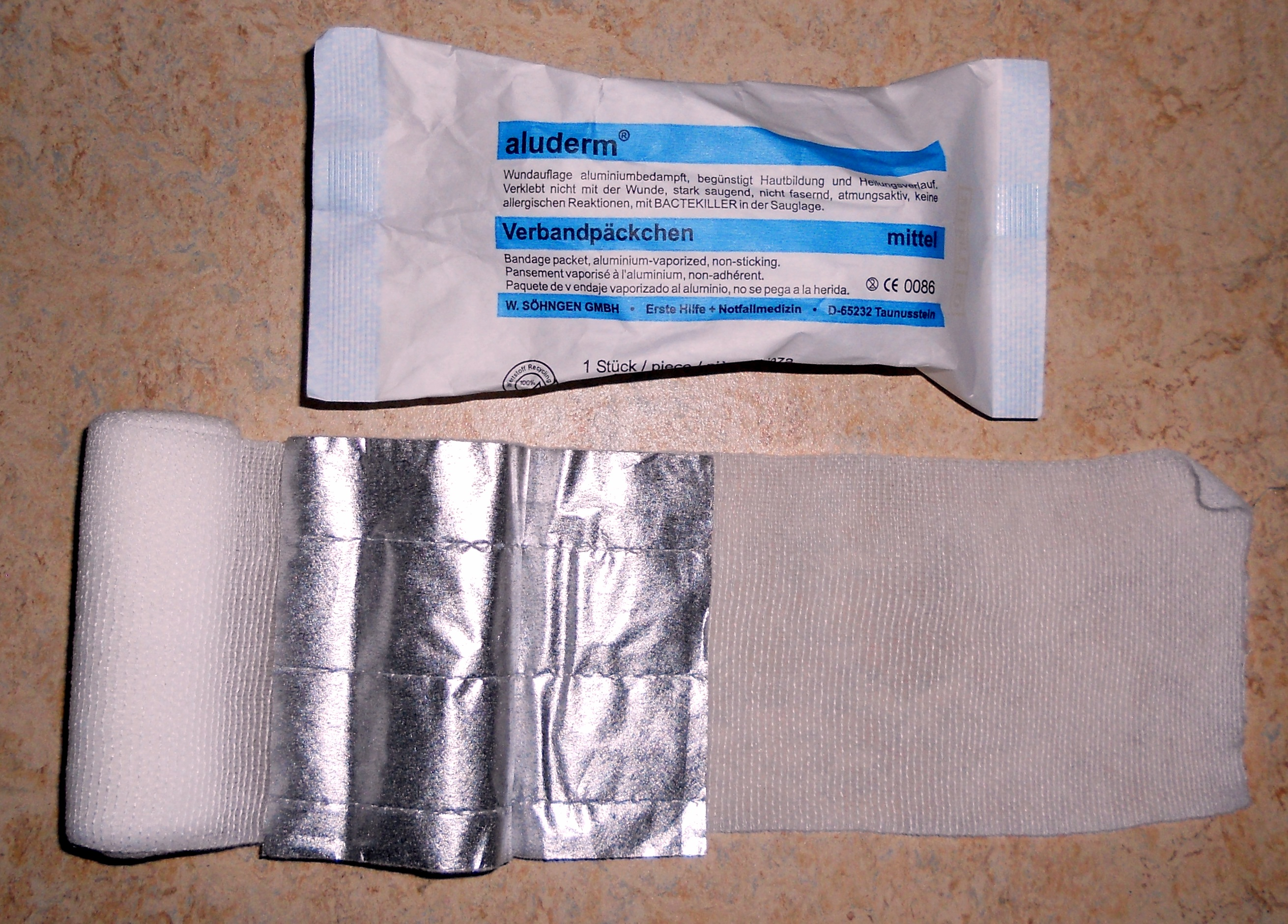 Verbandpäckchen in geschlossenem und offenen Zustand